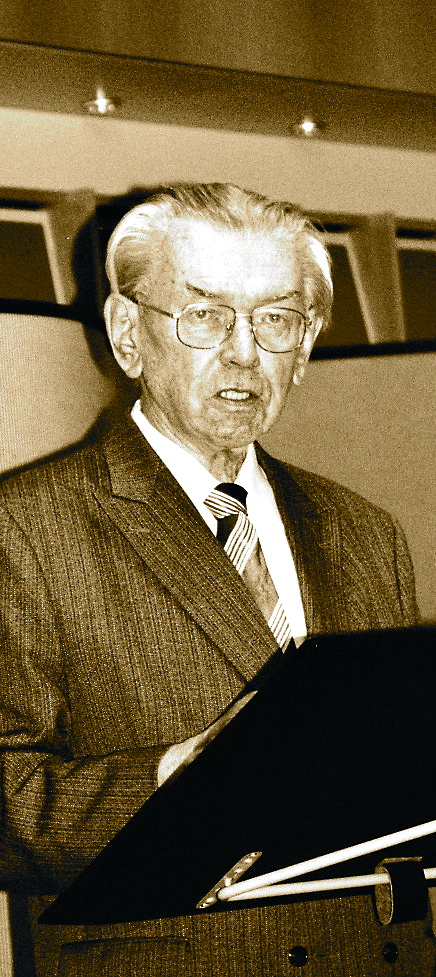 Wolfgang Ronner liest in Kronberg am 22. September 2004 aus seinem Roman.